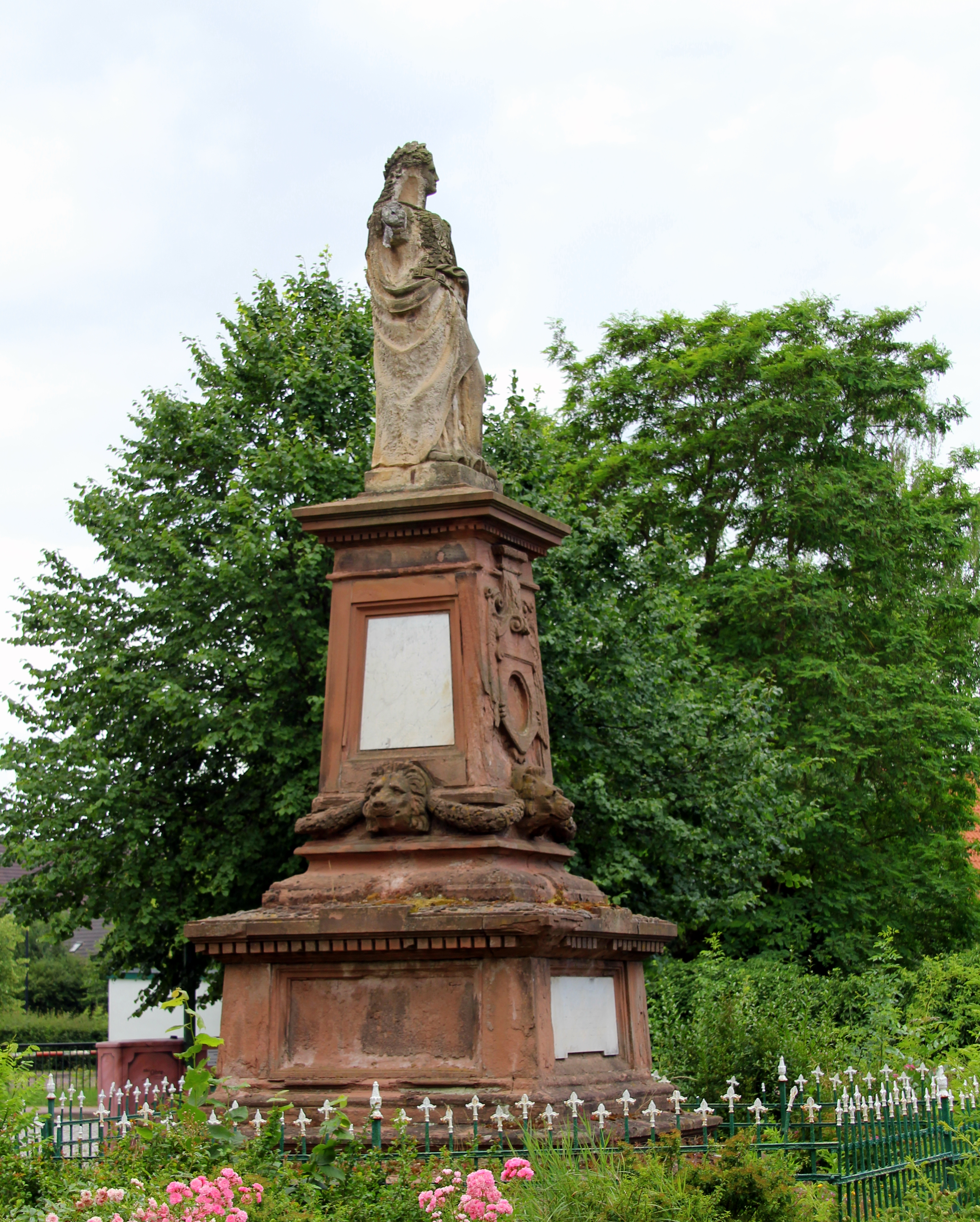 Kriegerdenkmal Hauptstraße Ecke Sellstedtstraße Nordgermersleben